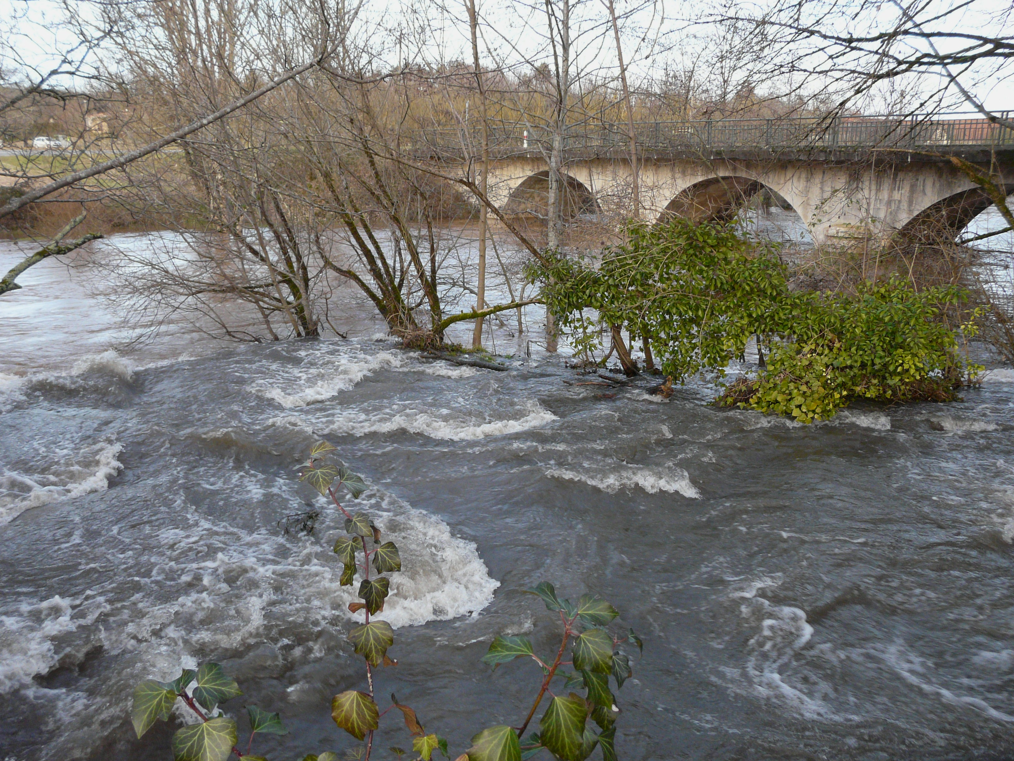 Le Blâme se jette dans l'Auvézère en cascades, lieu-dit les Forges d'Ans, La Boissière-d'Ans, Dordogne, France (vue prise depuis le dessus de la cascade)